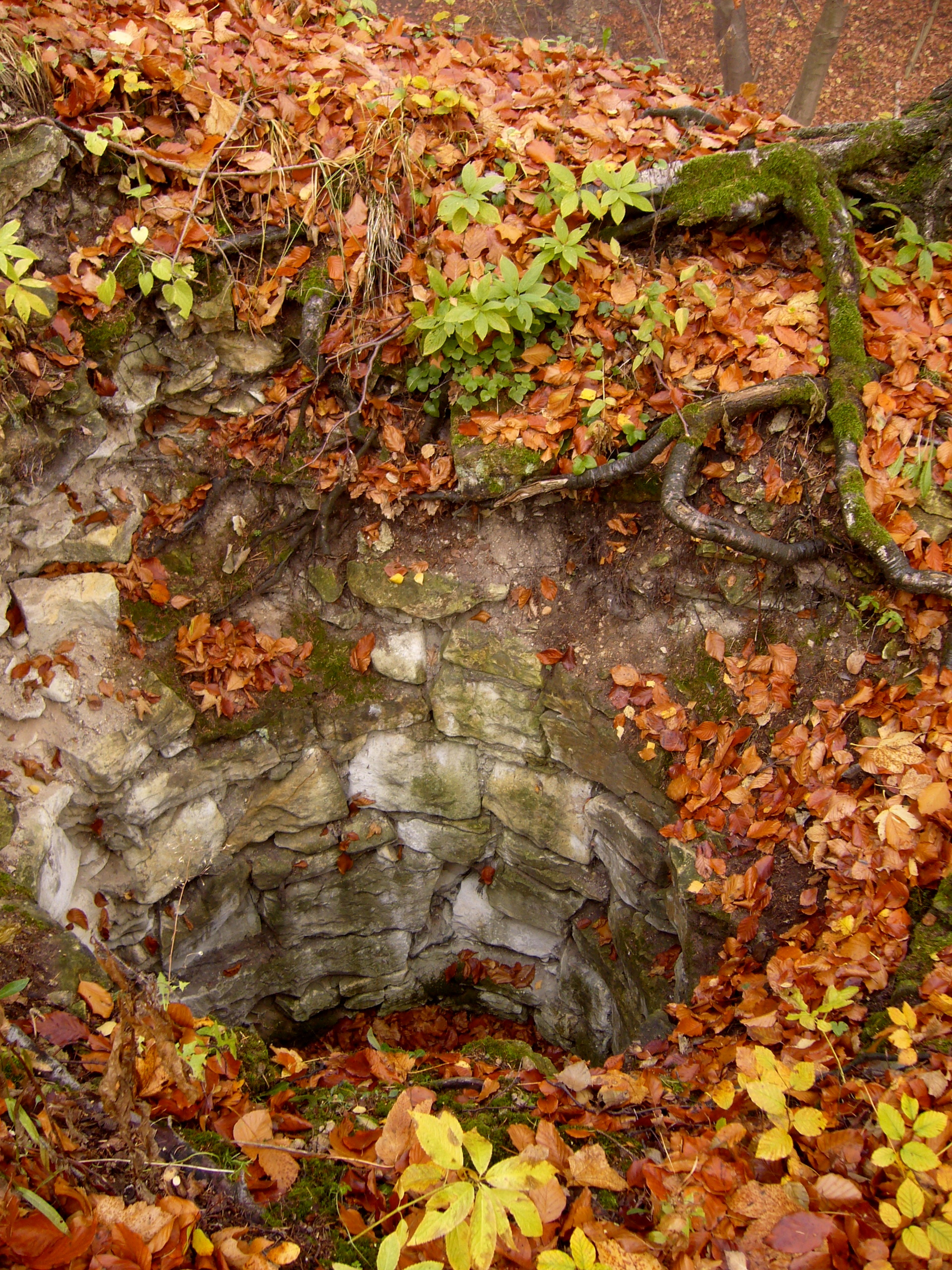 Fragment severní flankovací věže Hrad Džbán, jihozápadně od Lhoty, k. ú. Mutějovice a k. ú. Lhota pod Džbánem, Mutějovice.